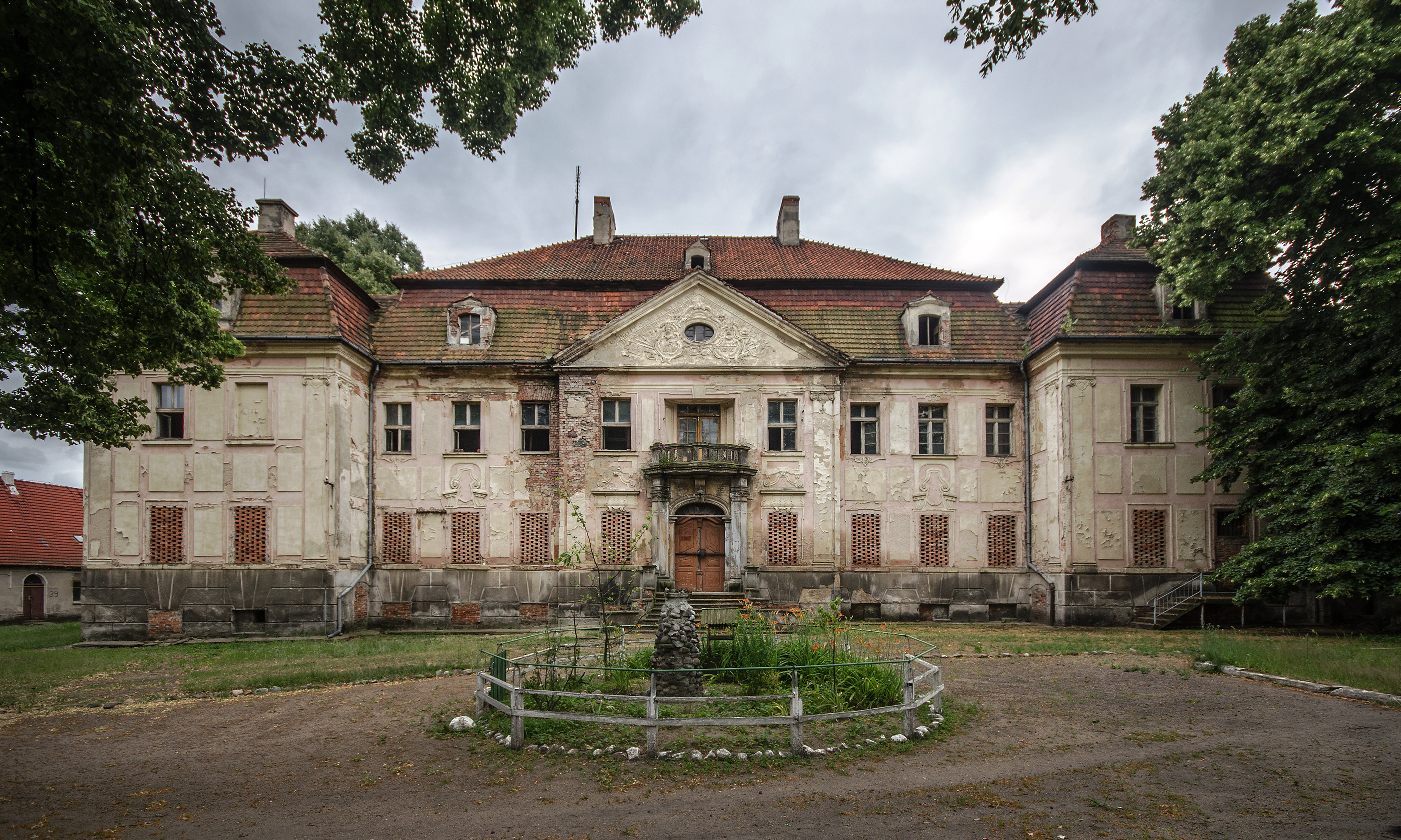 Żukowice, pałac, 1743